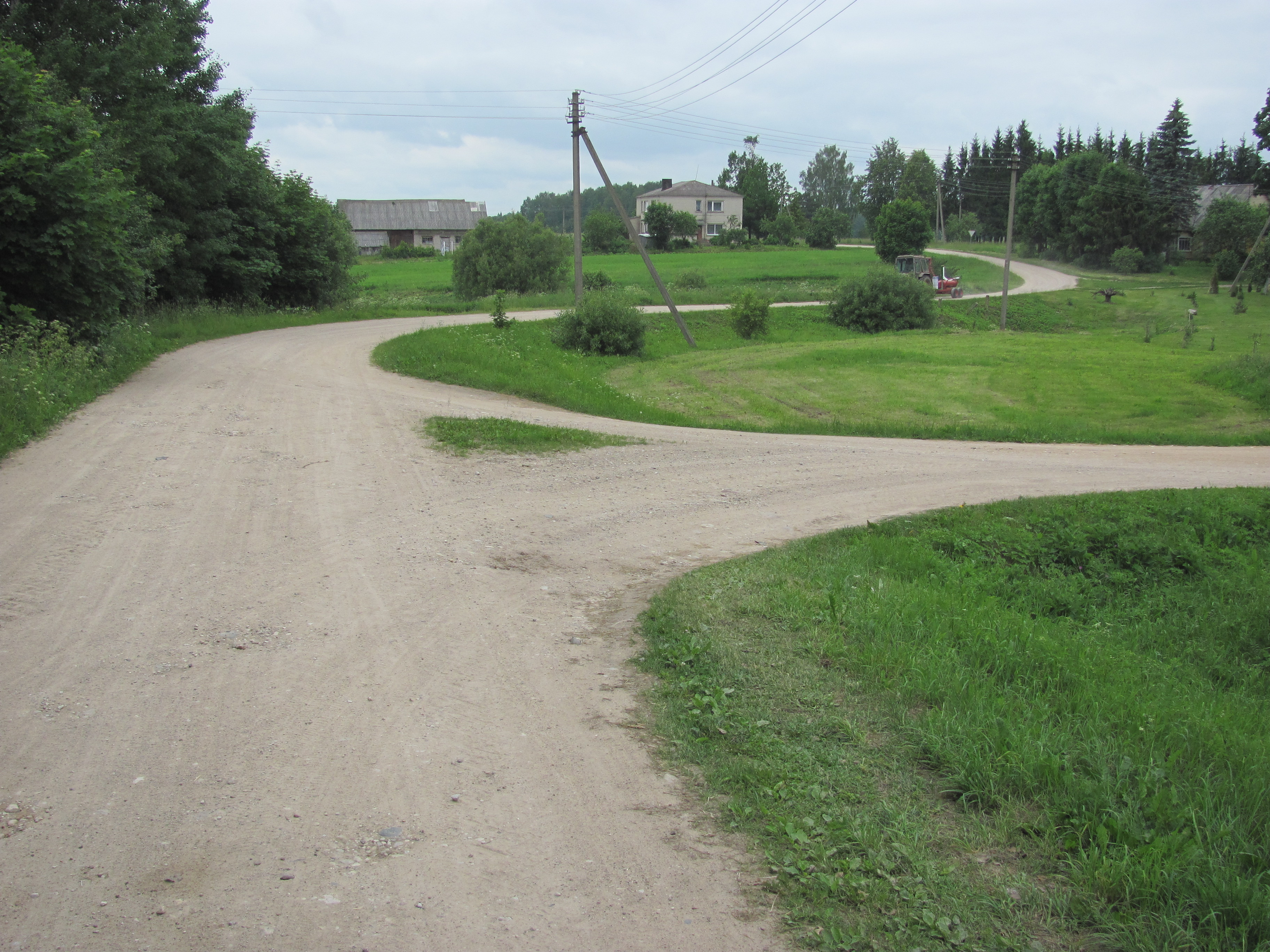 Rokėnai, Lithuania